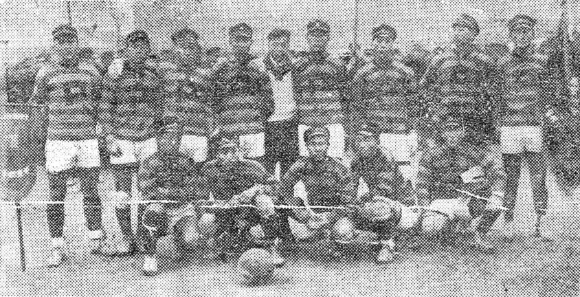 1923년 전국체육대회 축구(제4회 전조선축구대회) 중학부에서 우승한 배재고등보통학교 선수단의 모습.